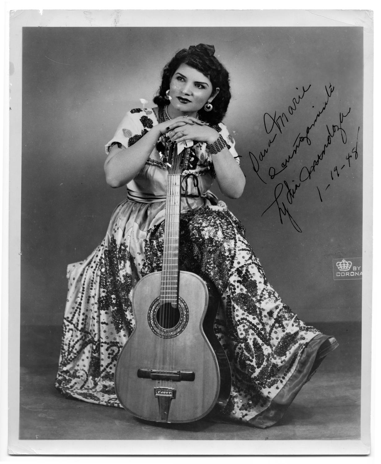 Fotografia de Lydia Mendoza en la pagina The Portal to Texas History